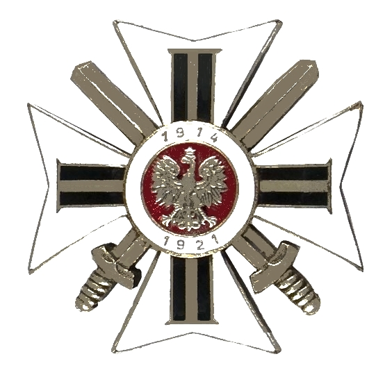 Odznaka Związku Byłych Ochotników Armii Polskiej